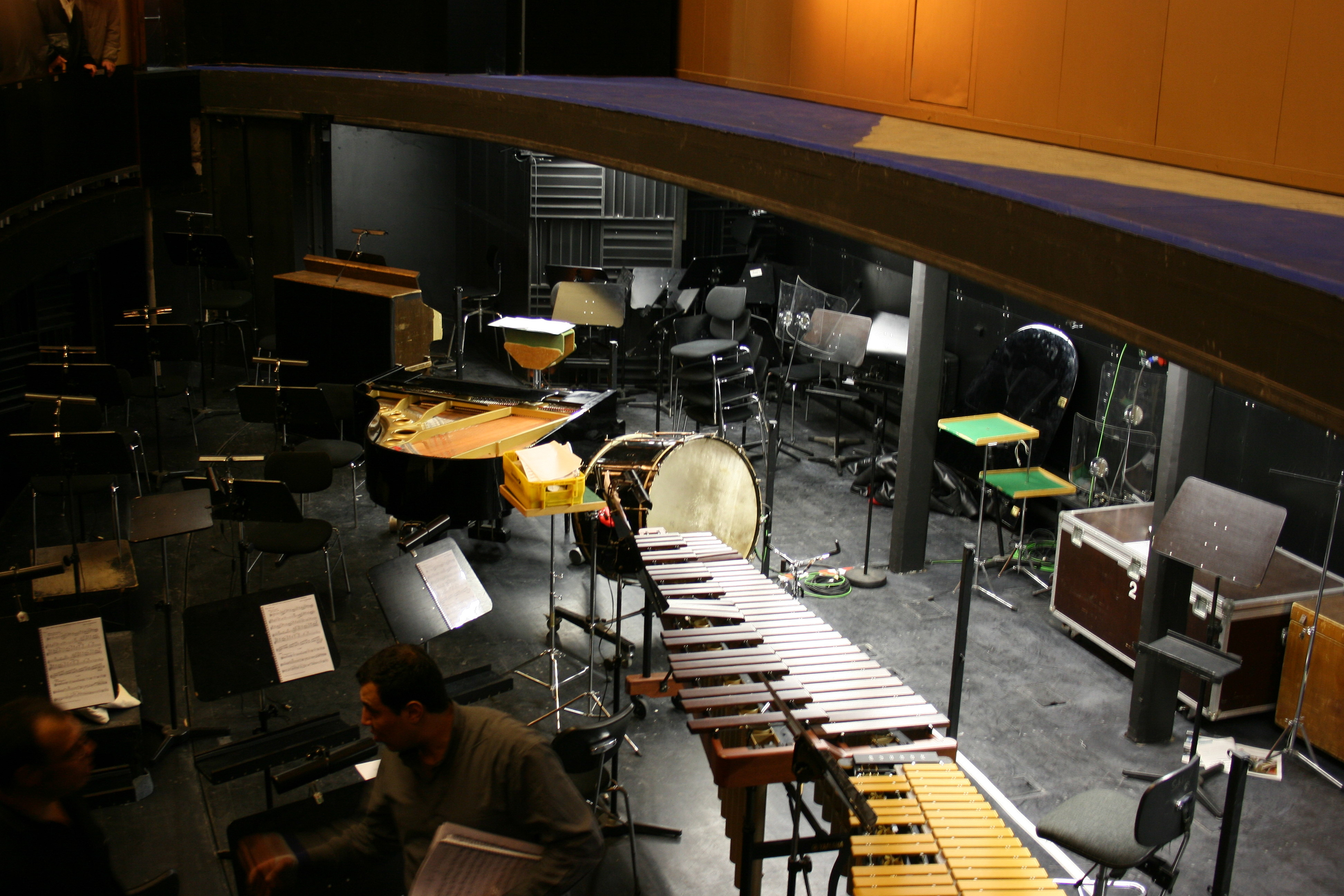 Opernhaus Wuppertal, erste Besichtigung nach dem Umbau